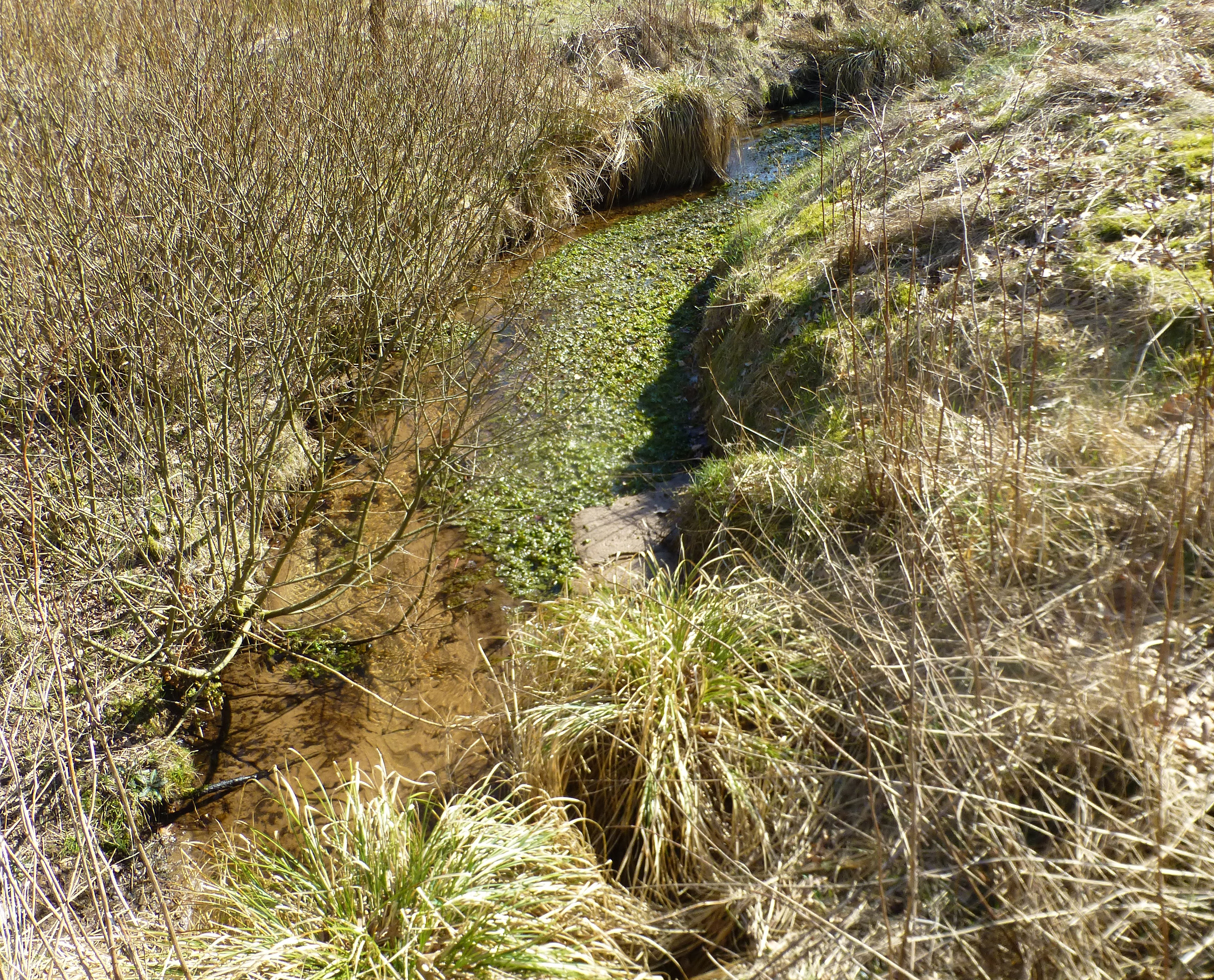 Skjern Å hvor den løber under hærvejen